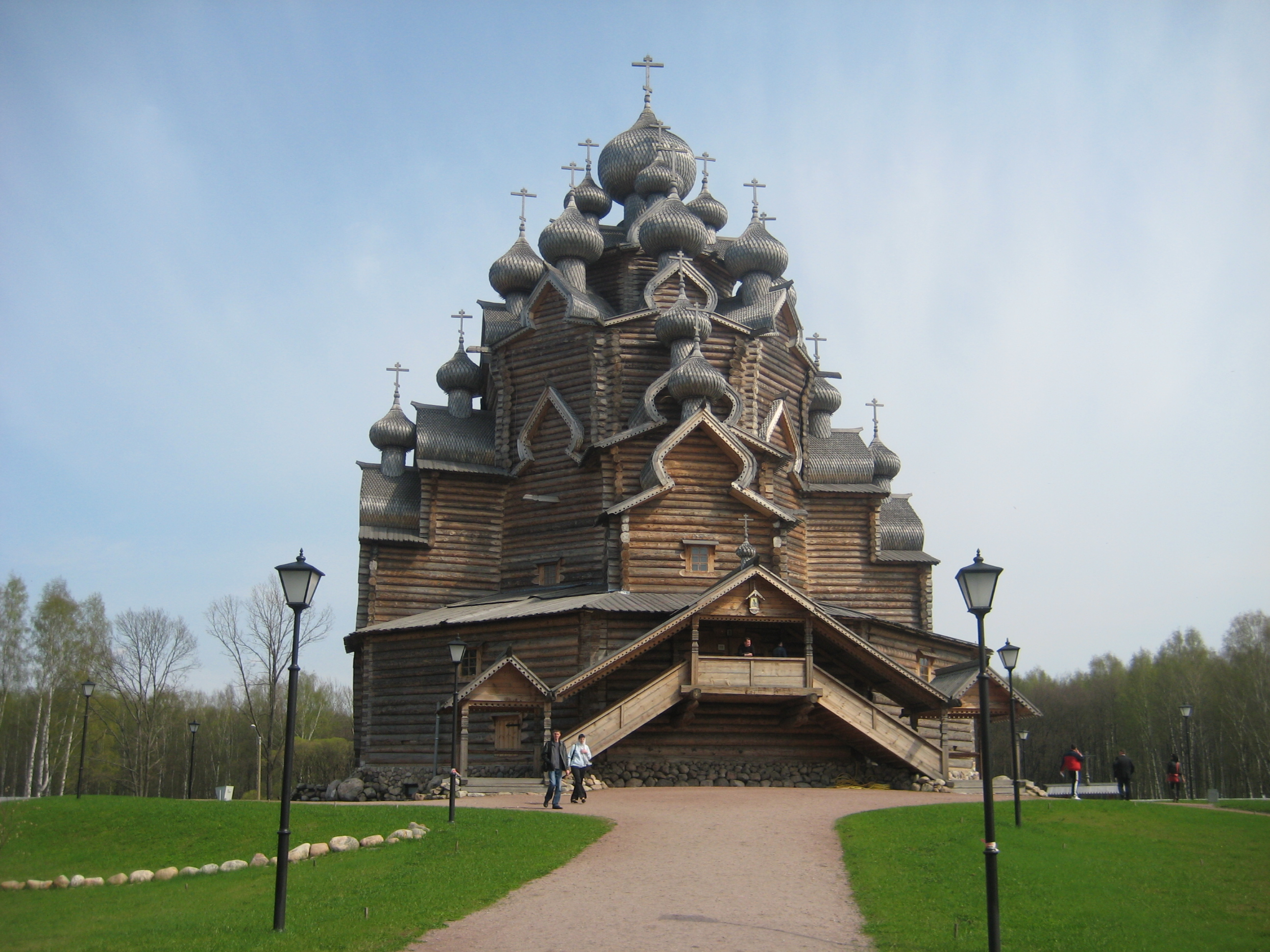 Покровская церковь (Невский лесопарк)